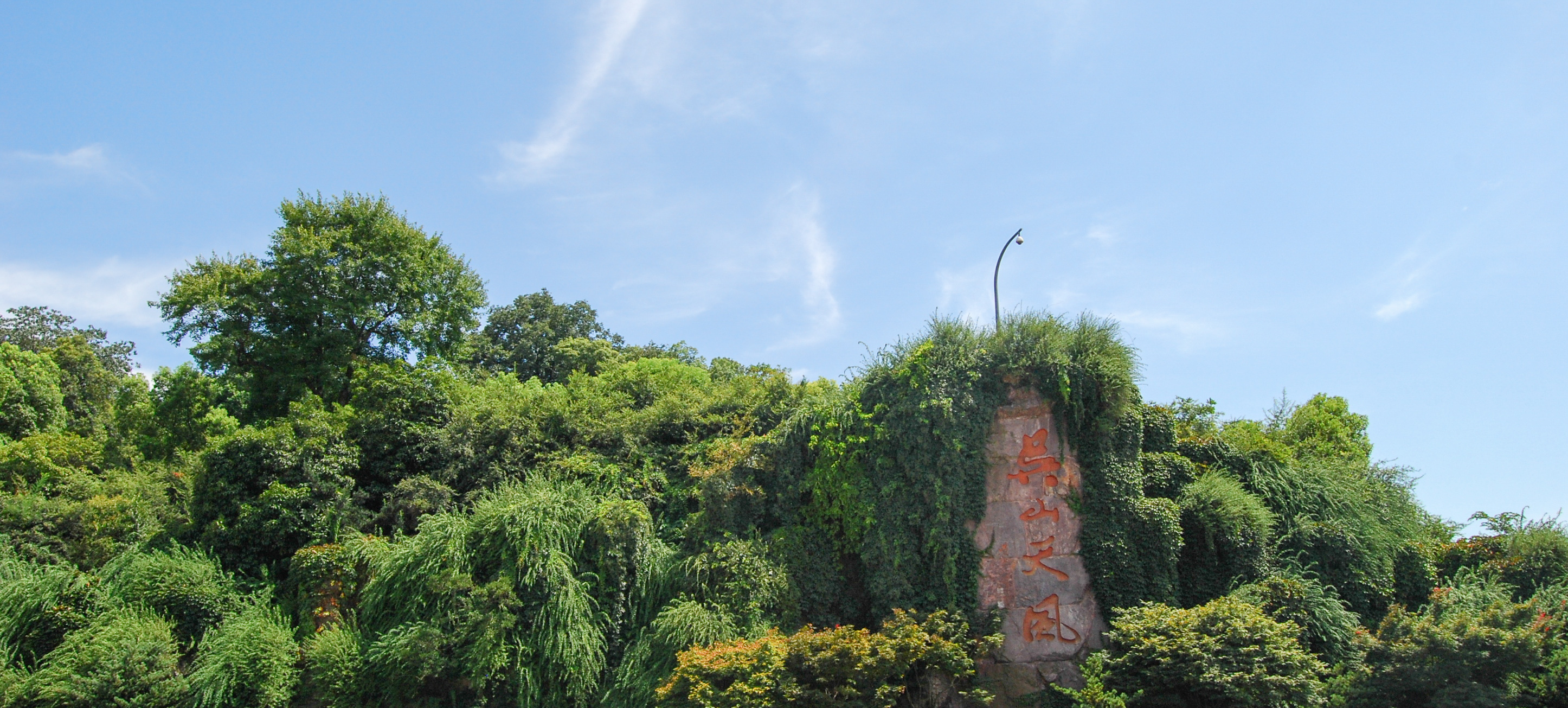 中文（中国大陆）: 西湖十景：吴山天风